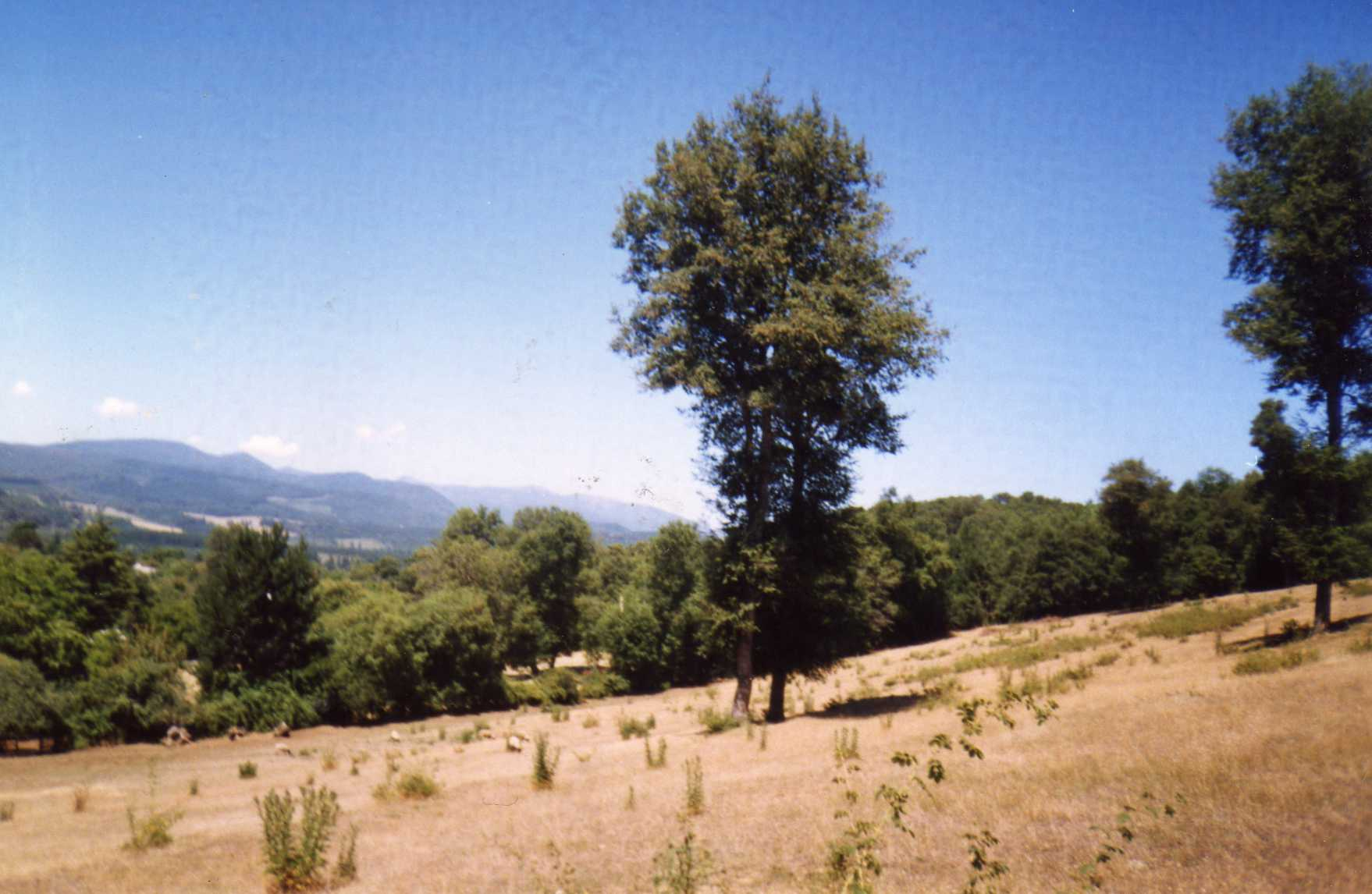 Vista de un cerro de Trupan